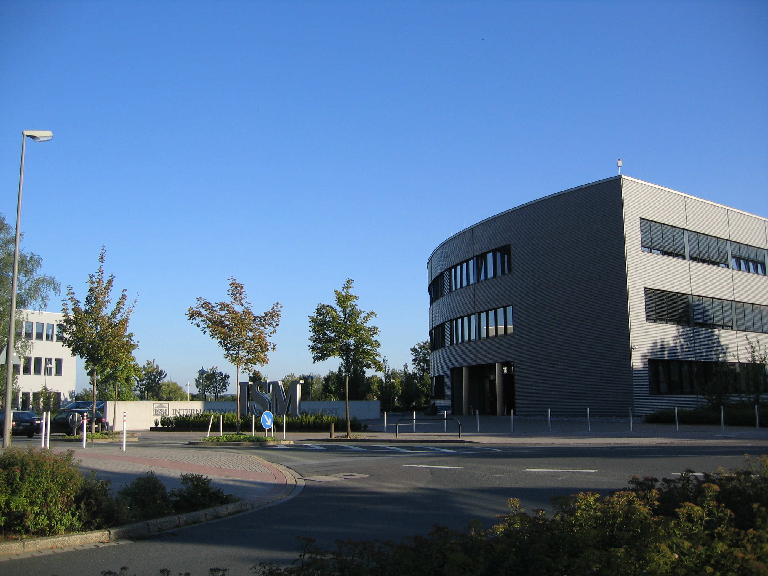 International School of Management Eigene Aufnahme September 2006